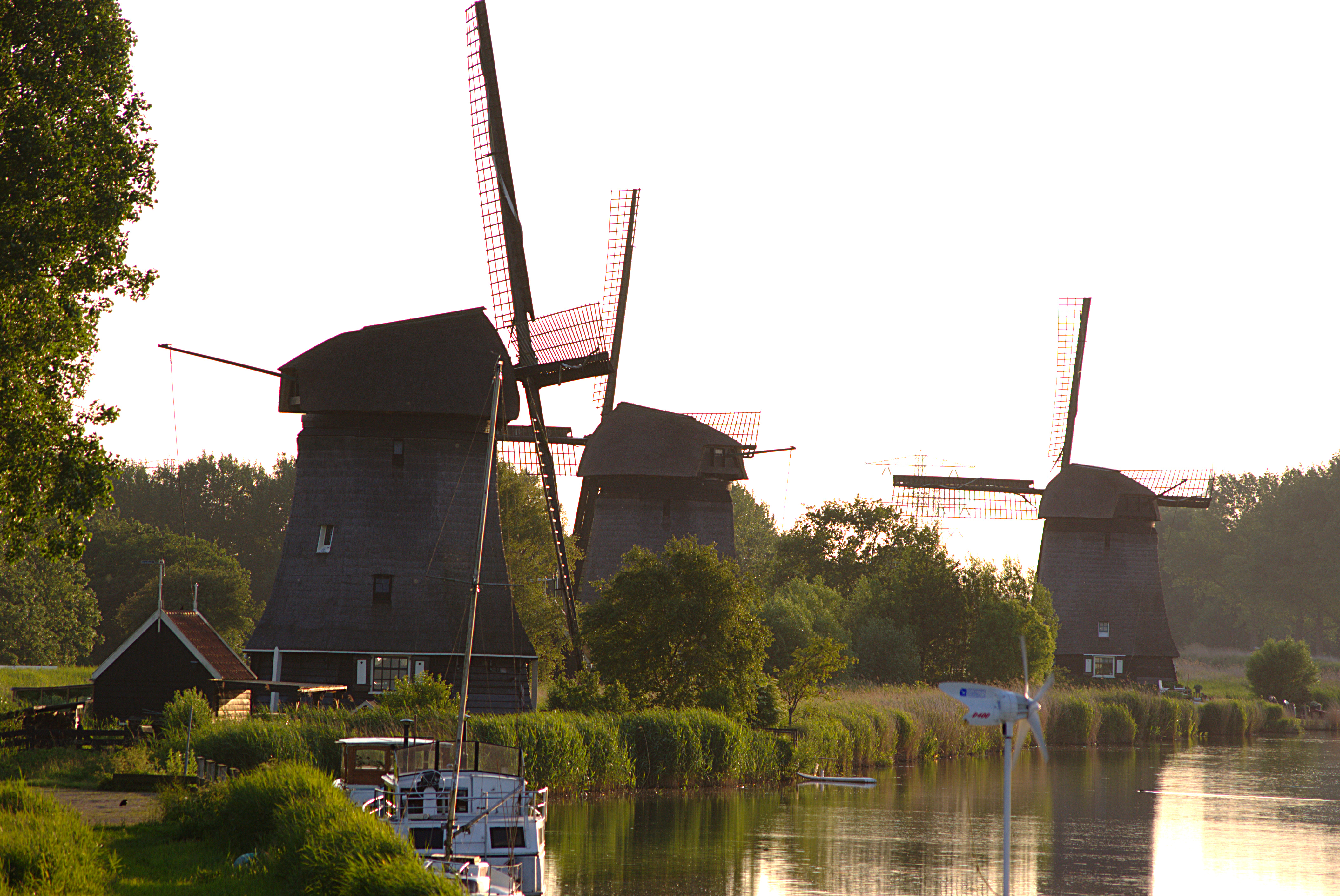 3 strijkmolens (uit 1864, 1631 en 1631) aan de Noordschermerdijk in Stompetoren.